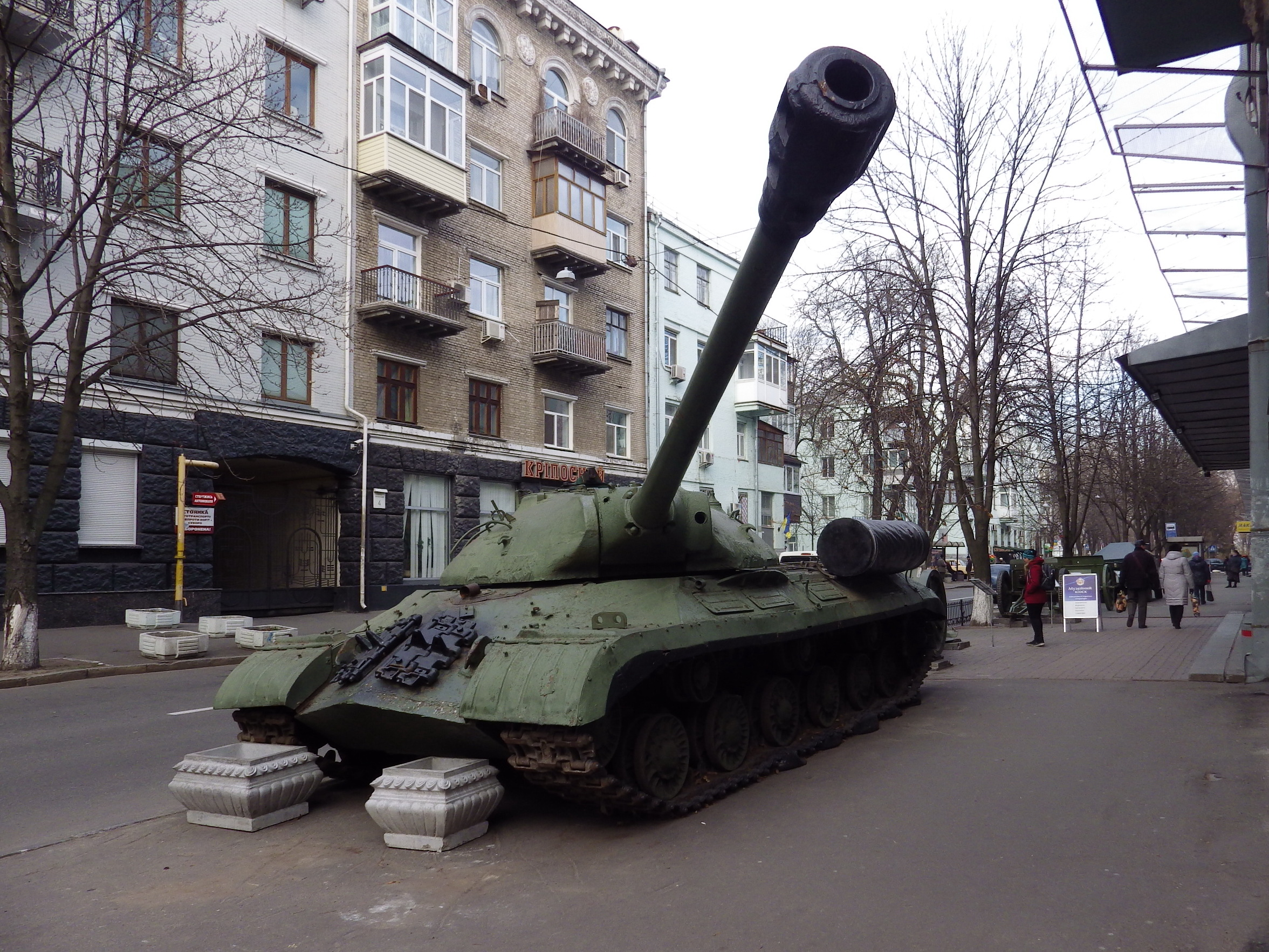 Танк снят членами ДНР с постамента в городе Константиновка Донецкой области. Использовался против украинских военных в боях под селом Ульяновка. Во время освобождения украинскими войсками Константиновки был найден бойцами 95-й отдельной аэромобильной бригады и спецподразделения Государственной службы охраны. Сейчас находится в Киеве на улице Грушевского возле Национального военно-исторического музея Украины.